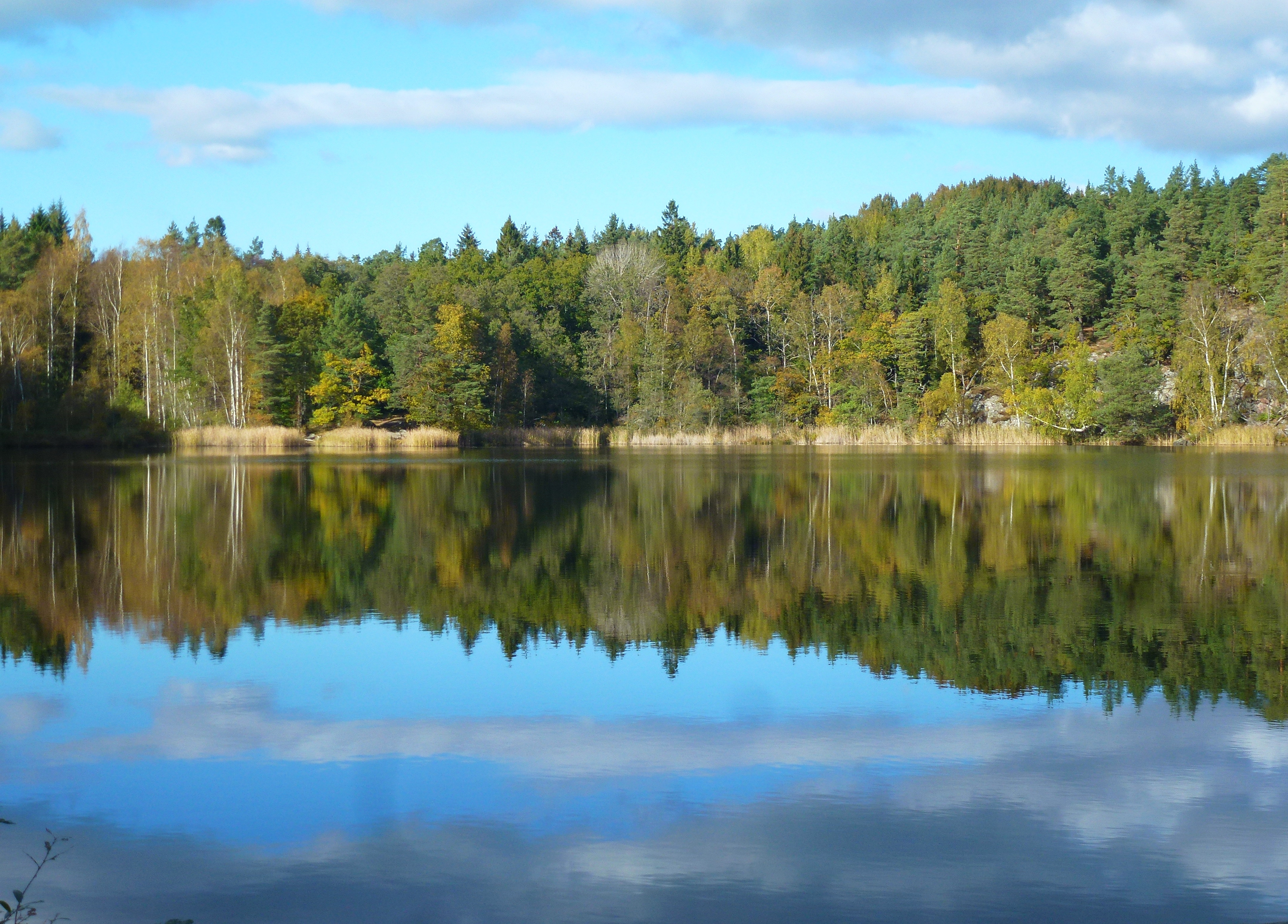 Ulvsjön Nacka kommun